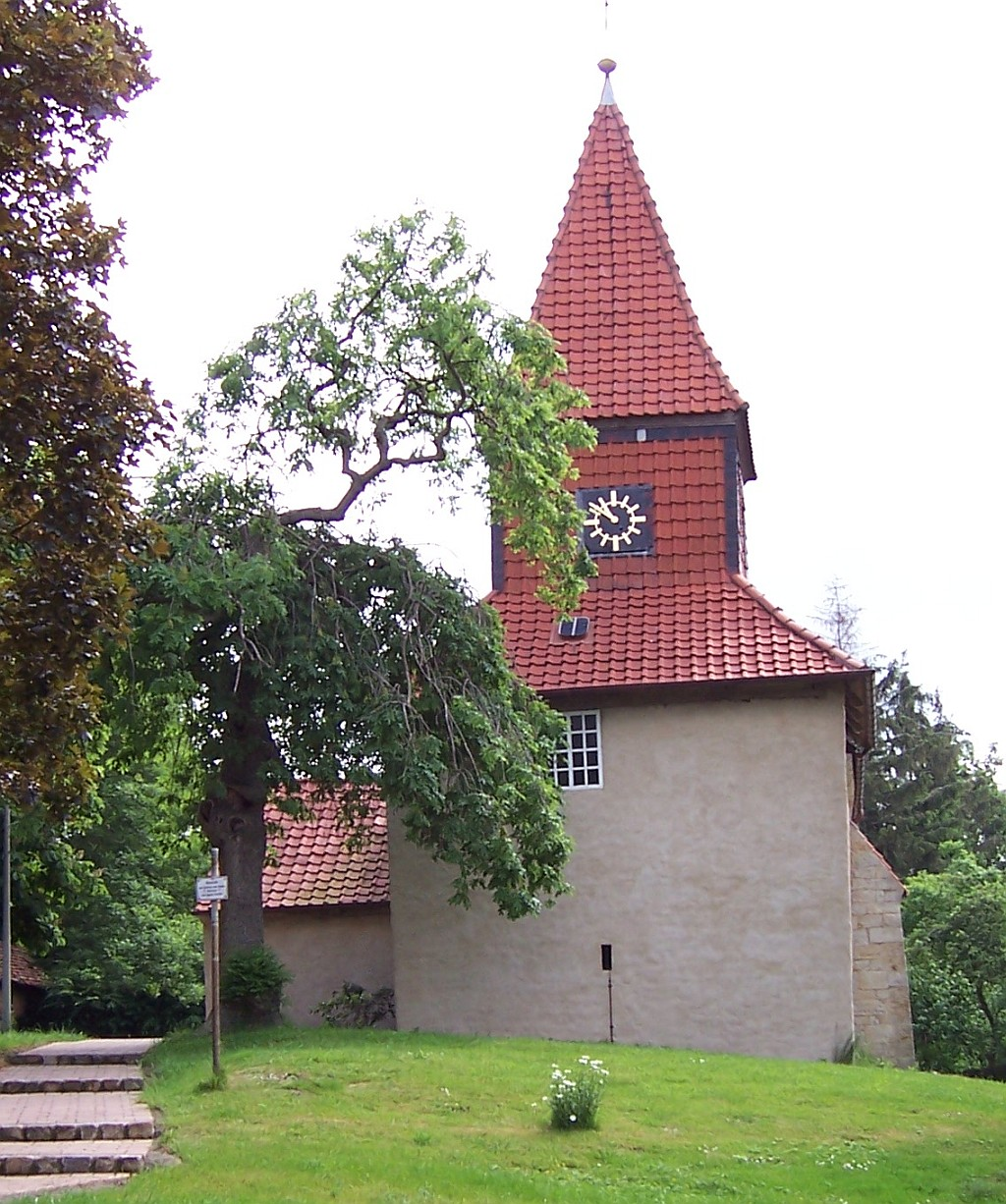 Kirche Wettmershagen (aus westlicher Richtung fotografiert)